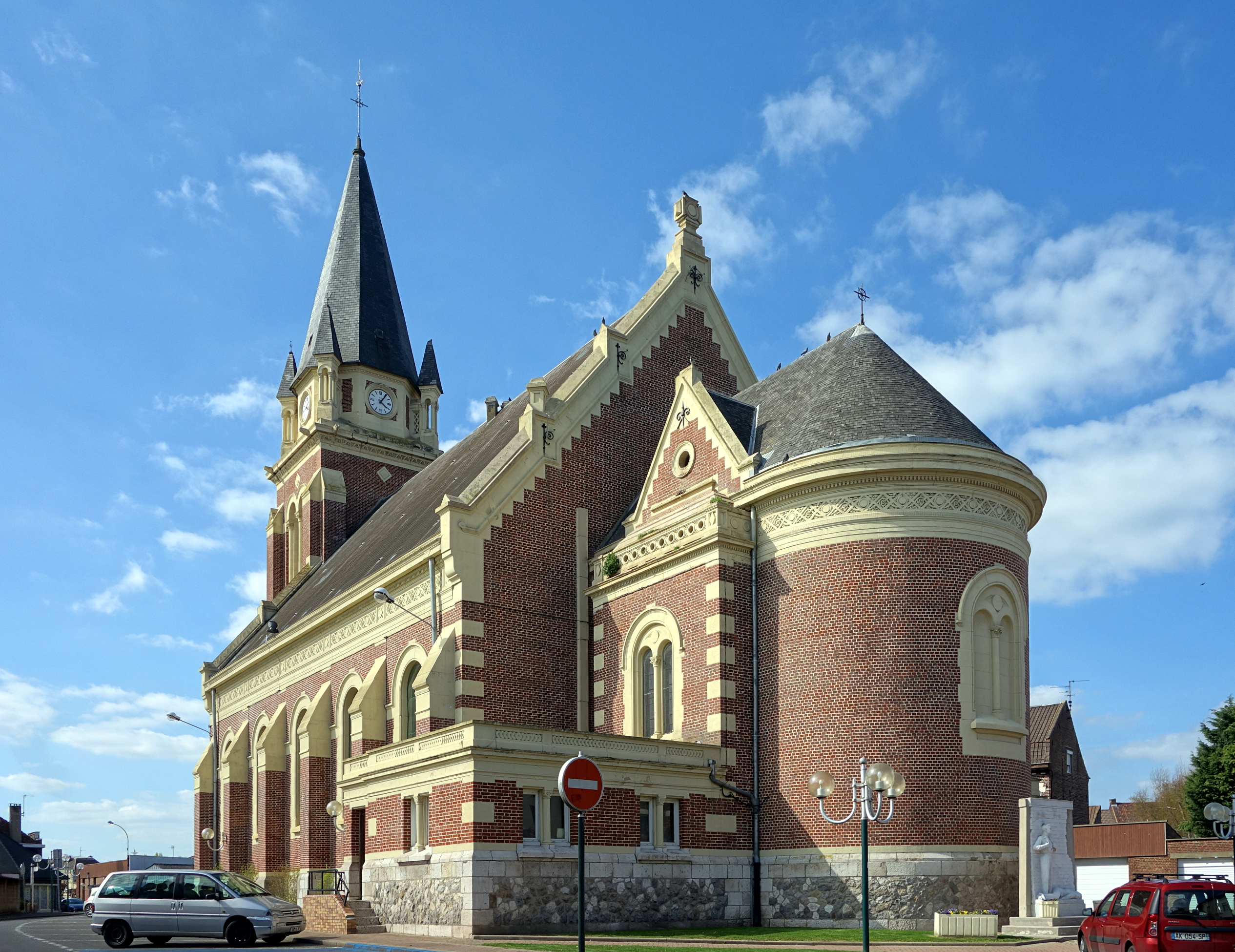 L'église Saint-Vaast de Pont-à-Vendin.